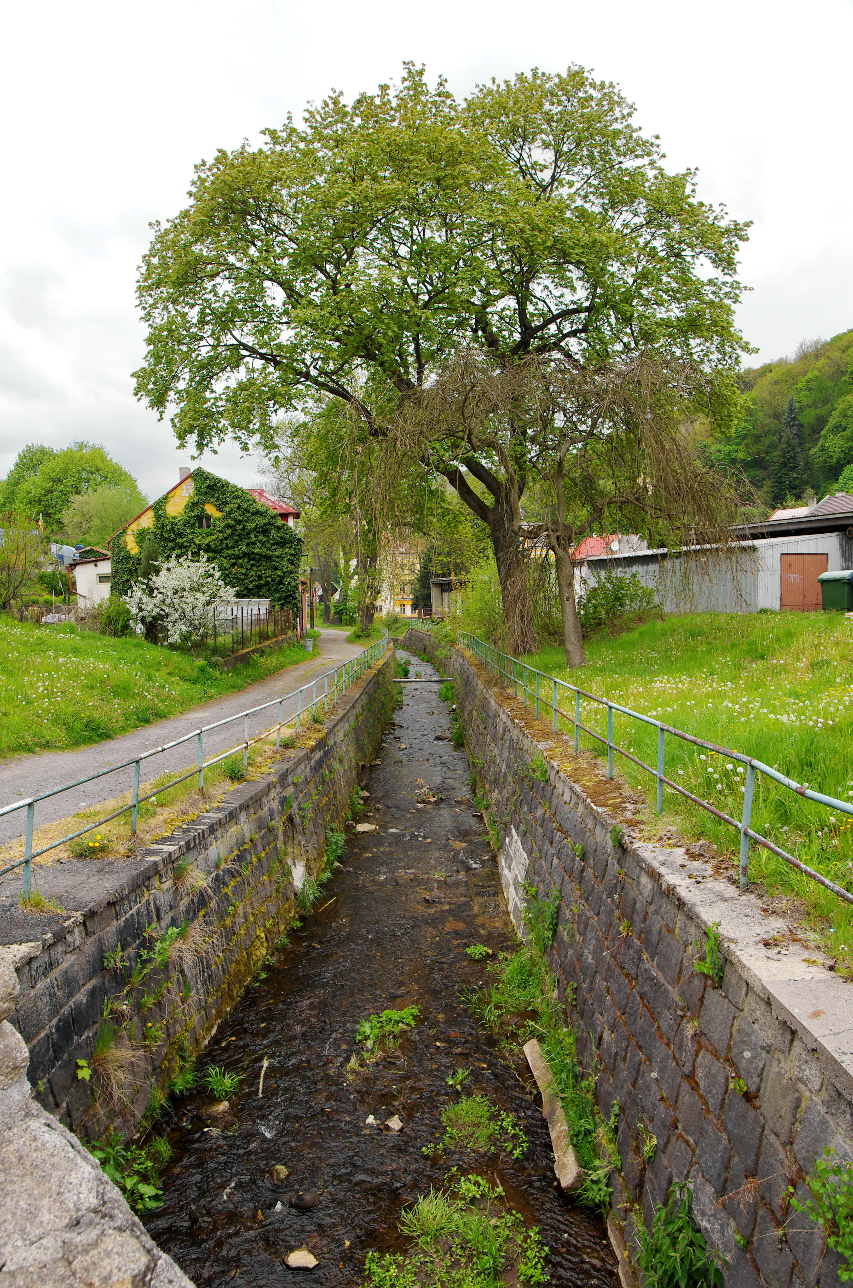 Potok Stoka v Horním Slavkově, okres Sokolov